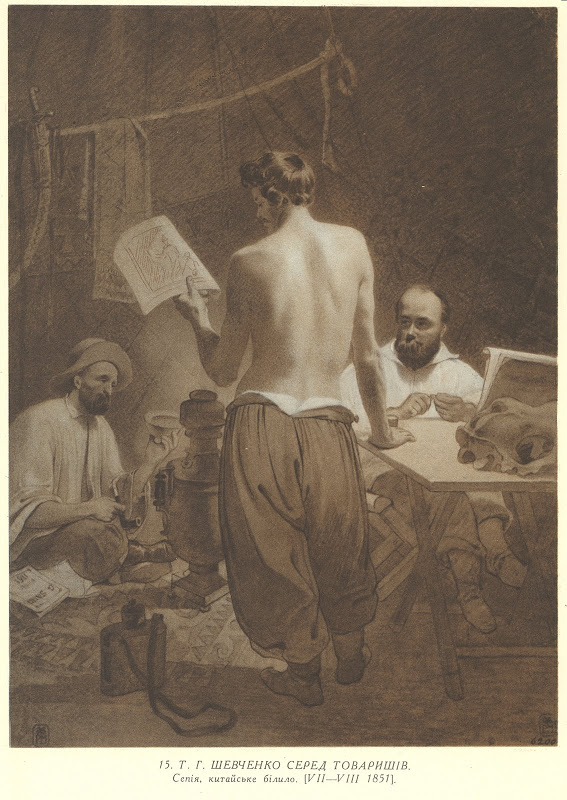 Шевченко серед товаришів.